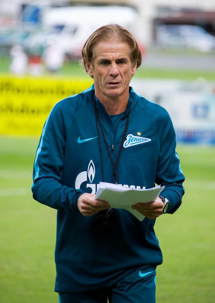 17.06.2017. Австрия, Гойнг-ам-Вильден-Кайзер. «Газпром»-тренировочные сборы в Австрии: вечерняя тренировка.